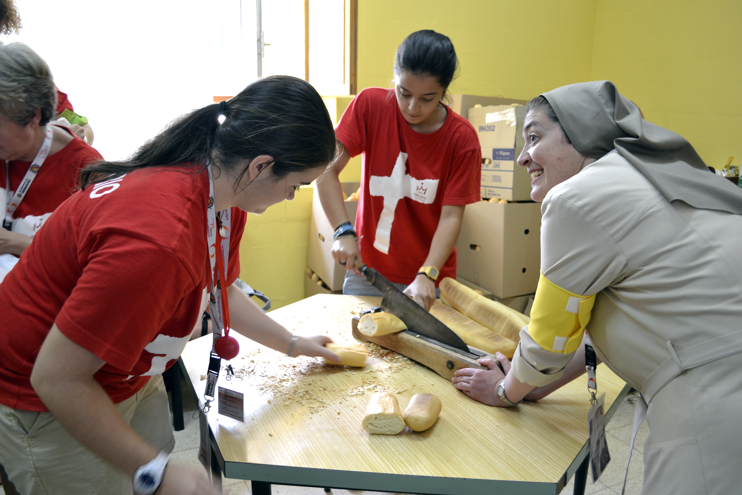 Voluntarios de la JMJ.